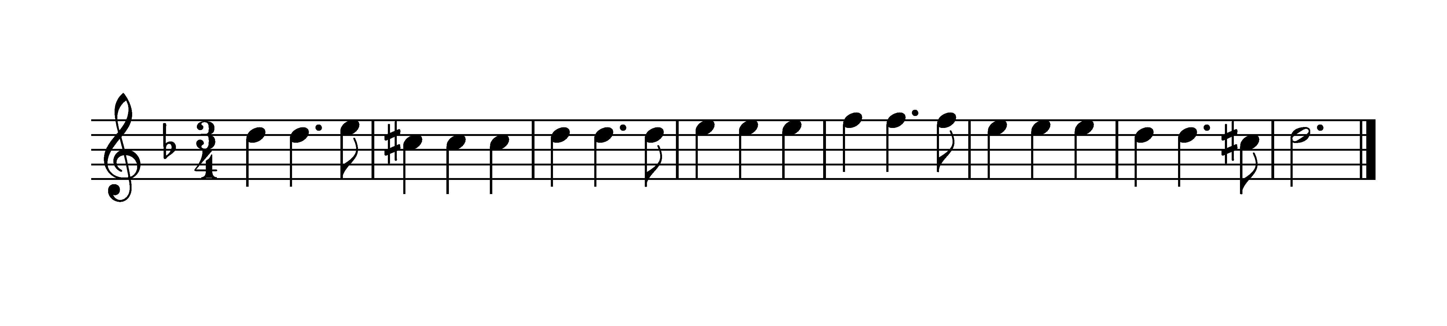 Thème de la folia.